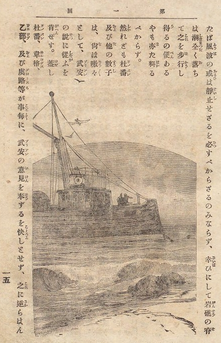 ジュール・ヴェルヌ著『十五少年漂流記』の日本初訳版挿絵と文。船が島に座礁し、少年たちがどうするか話し合う場面。